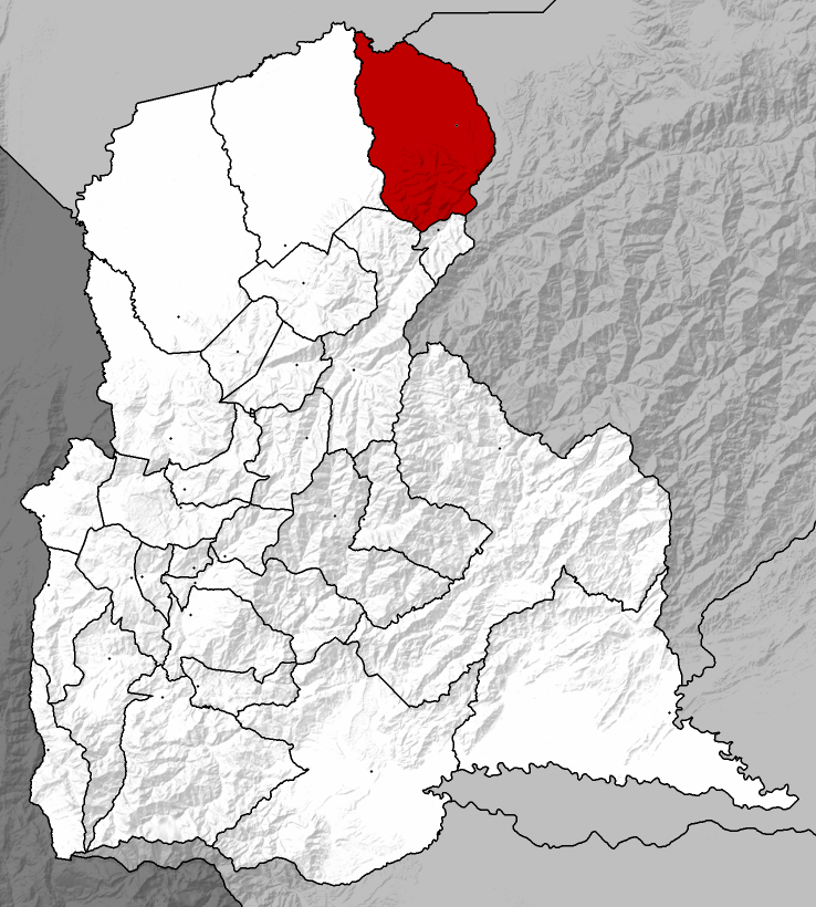 Municipio Samuel Darío Maldonado - Táchira